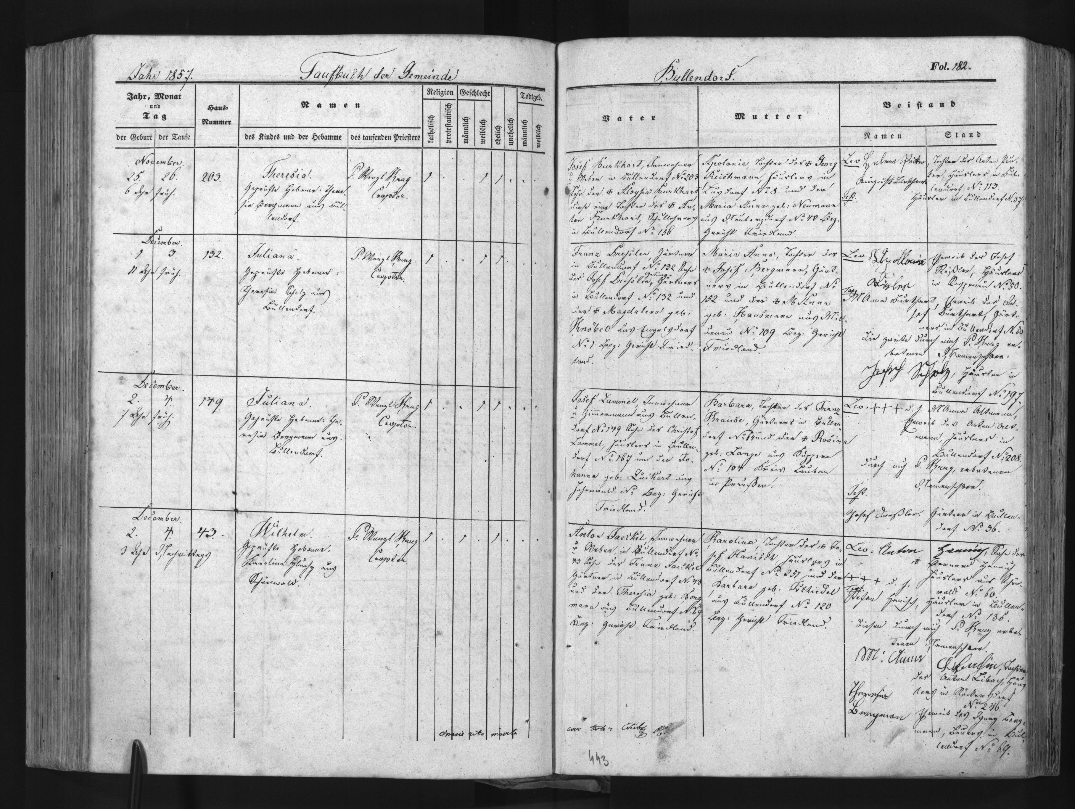 Registro de nascimento e batismo de Juliana Lammel em dezembro de 1857 em Bullendorf no Reino da Boêmia (atual Bulovka na República Tcheca). Juliana, que aos 19 anos de idade se tornar uma das primeiras Lammel no Brasil, teve seu nome aportuguesado nos registros brasileiros, tornando-se Julia Lammel.